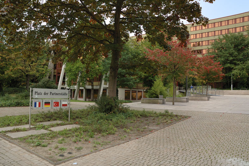 Germany Bergkamen Platz der Partnerstädte